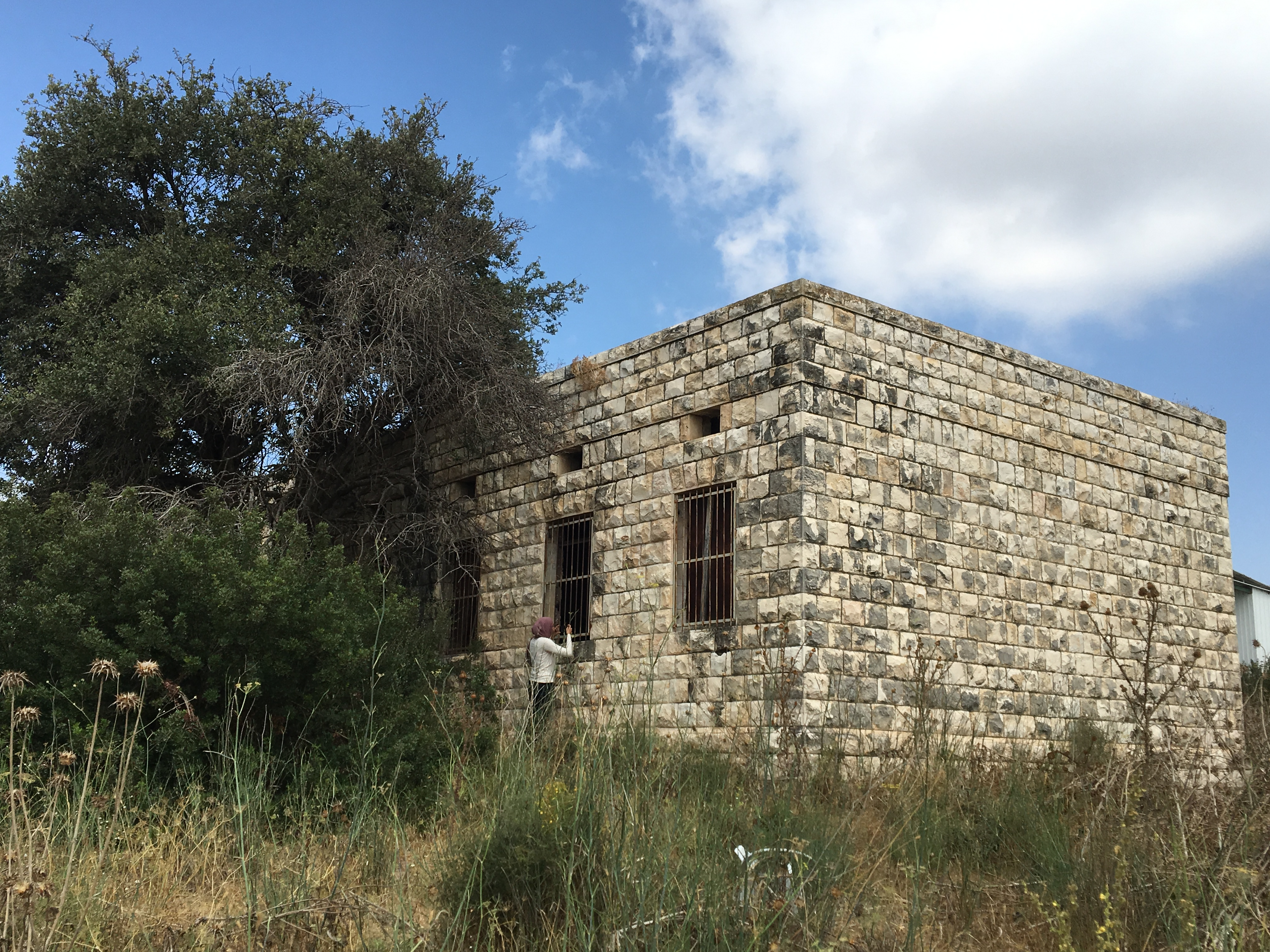 مدرسة قرية البروة- فلسطين